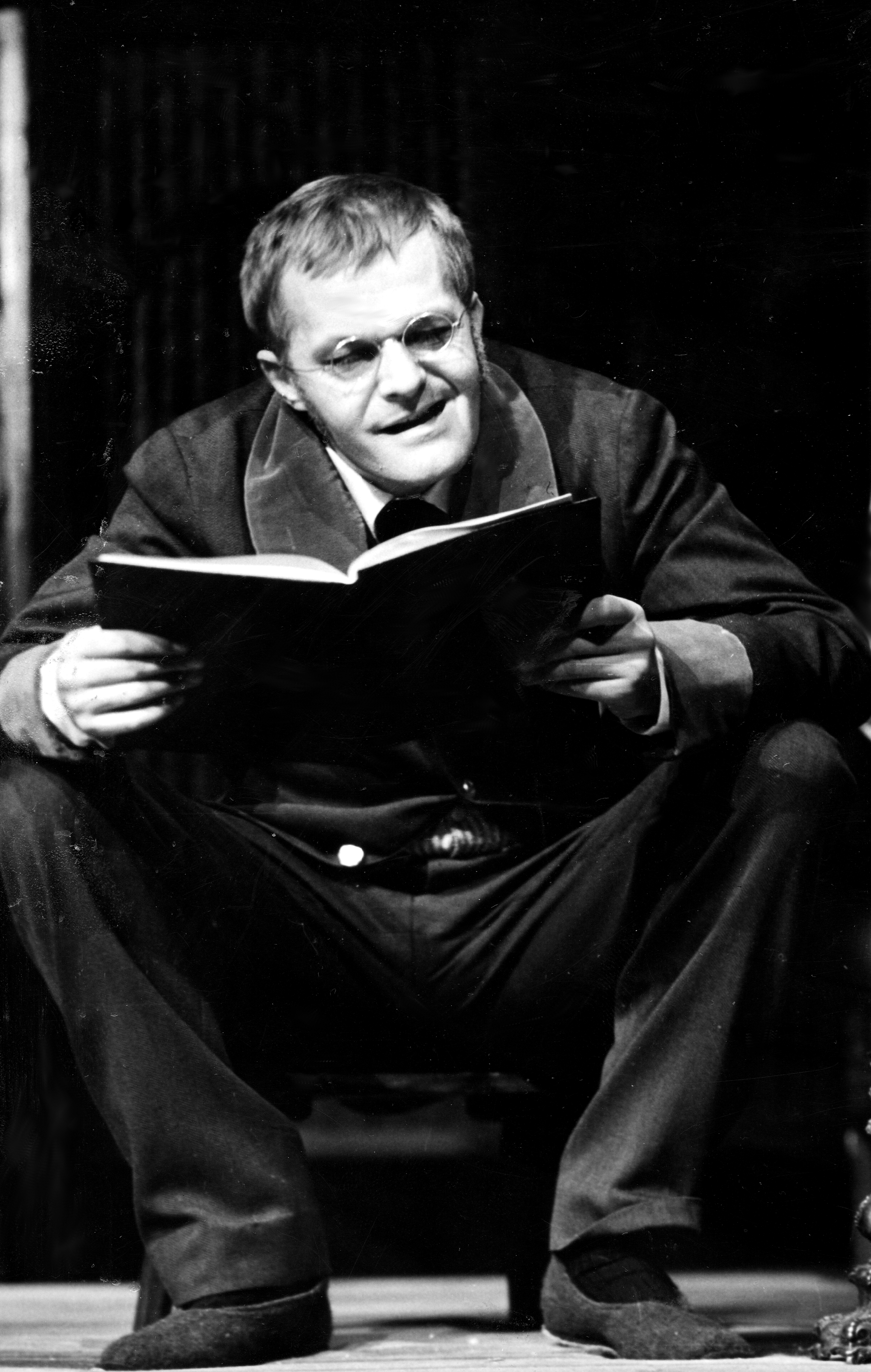 Pesti Színház, Darvas Iván színművész Gogol: Egy őrült naplója című darabjának előadásán.